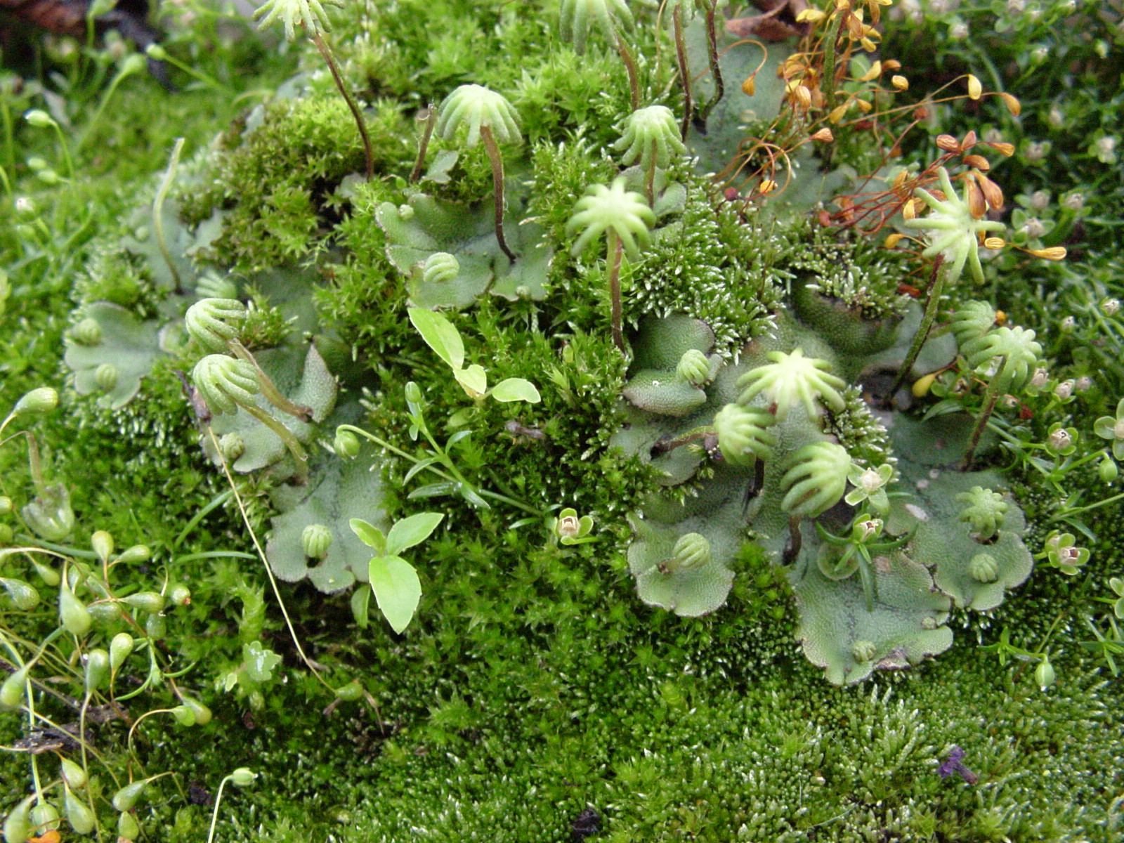 Moos